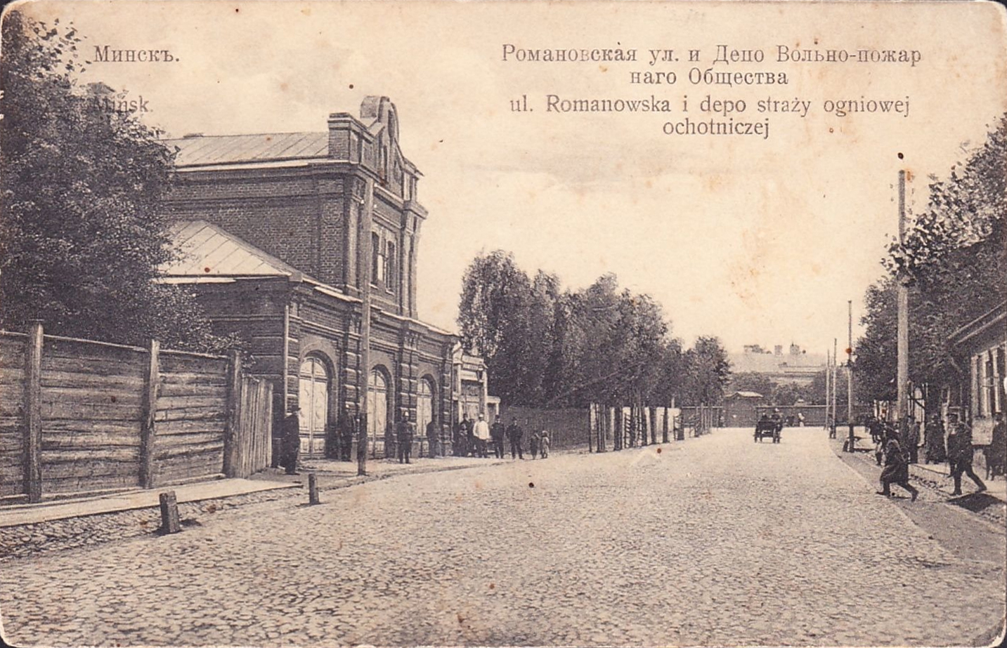 Беларуская (тарашкевіца): Менск (Miensk), Гарадзкі Вал (Haradzki Vał)